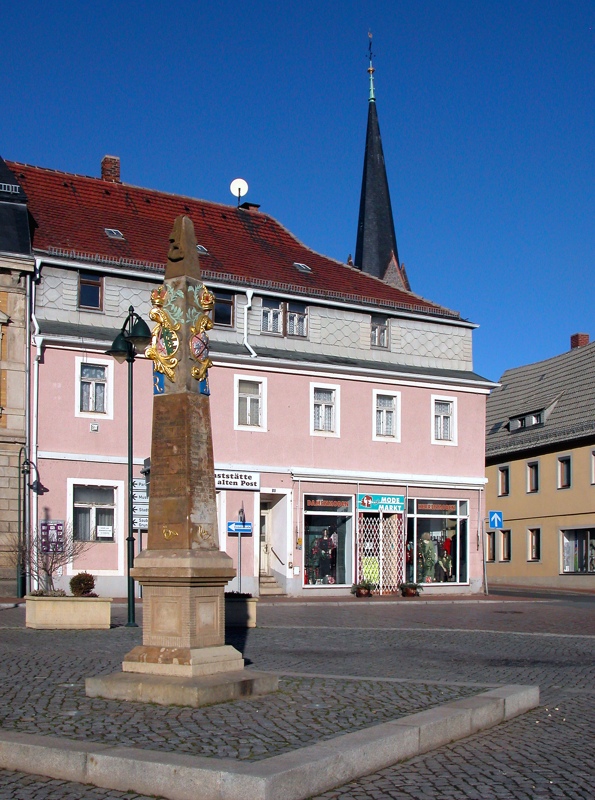 16.01.2005 01723 Wilsdruff: Kursächsische Postdistanzsäule von 1730 am Markt. [DSCN5787.TIF]20050116210DR.JPG(c)Blobelt